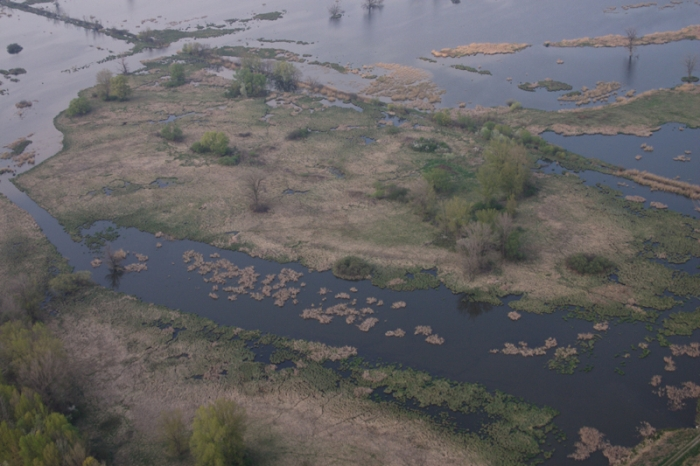 Légifelvétel a Nyirkai-Hany mocsárról (Csorna, Fertő–Hanság Nemzeti Park)